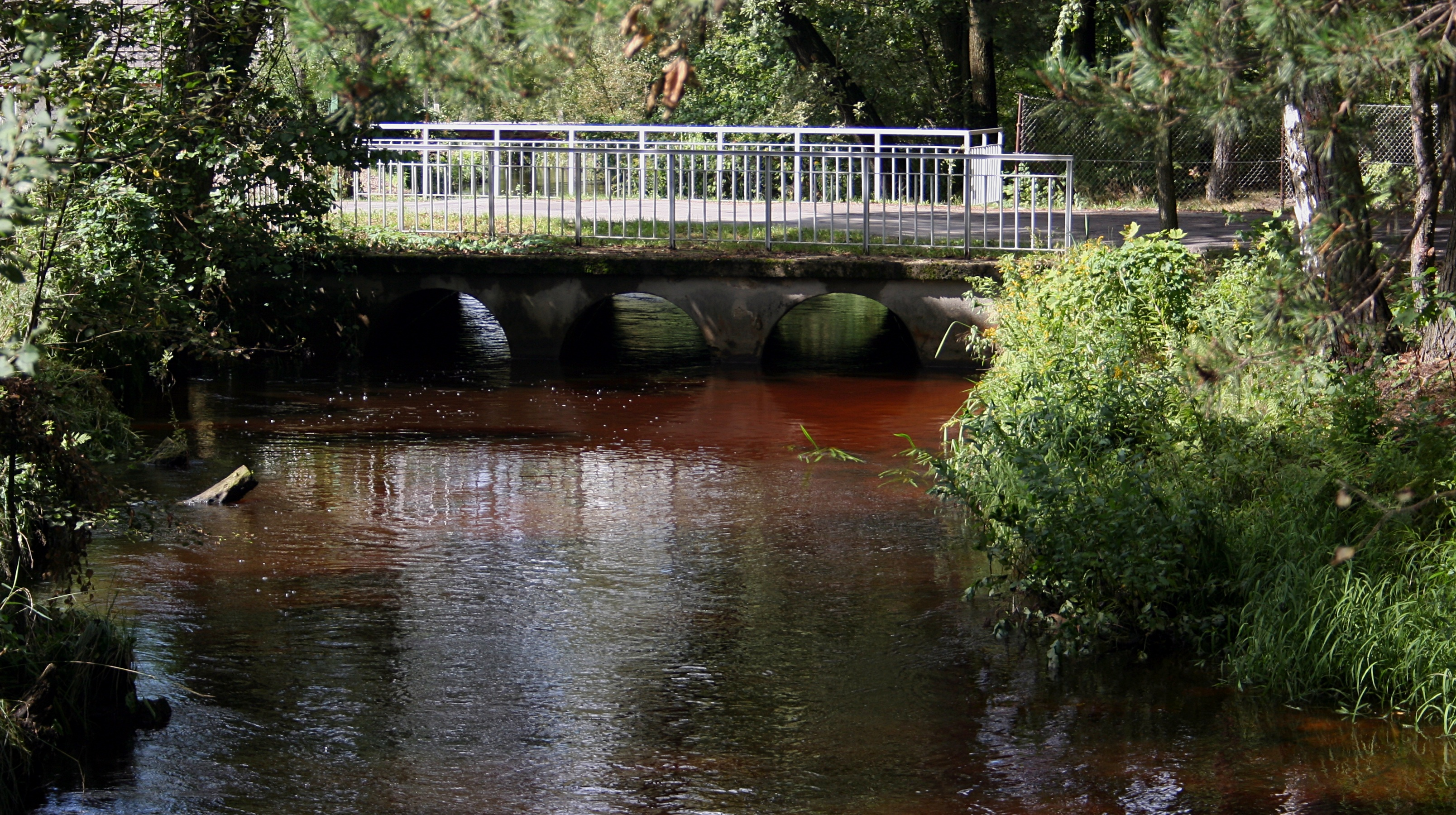 Rzeka Przyrwa przeplywająca w pobliżu skansenu w Kolbuszowej